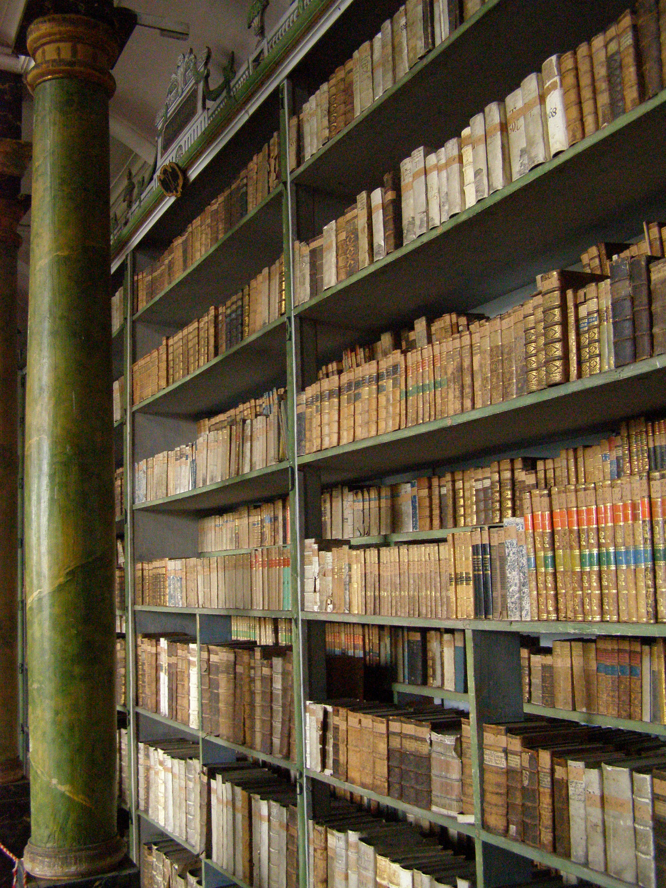 Broumov, knihovna benediktinského kláštera